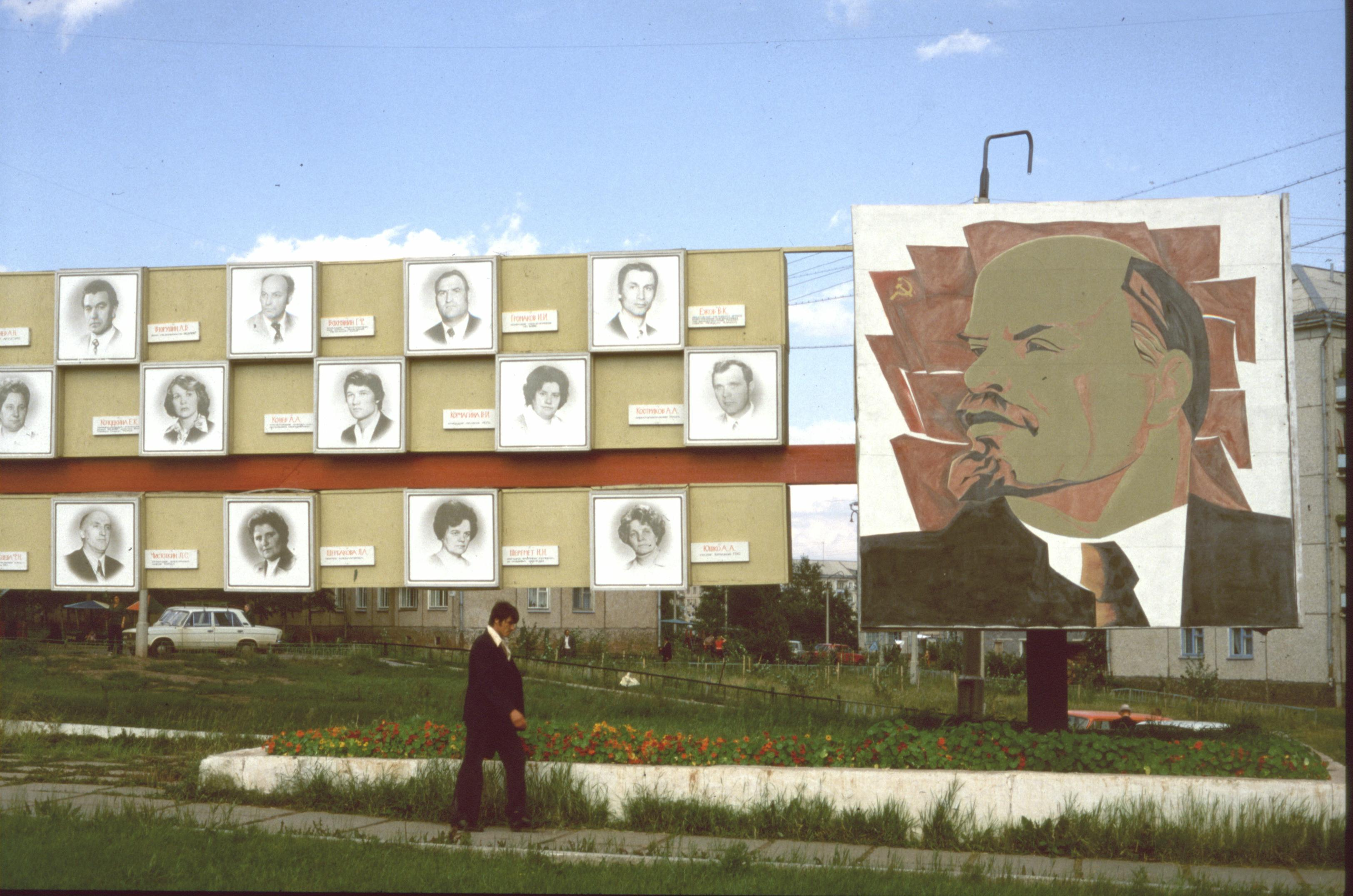 Bratsk im Sommer 1981, Tafel mit verdienten Persönlichkeiten